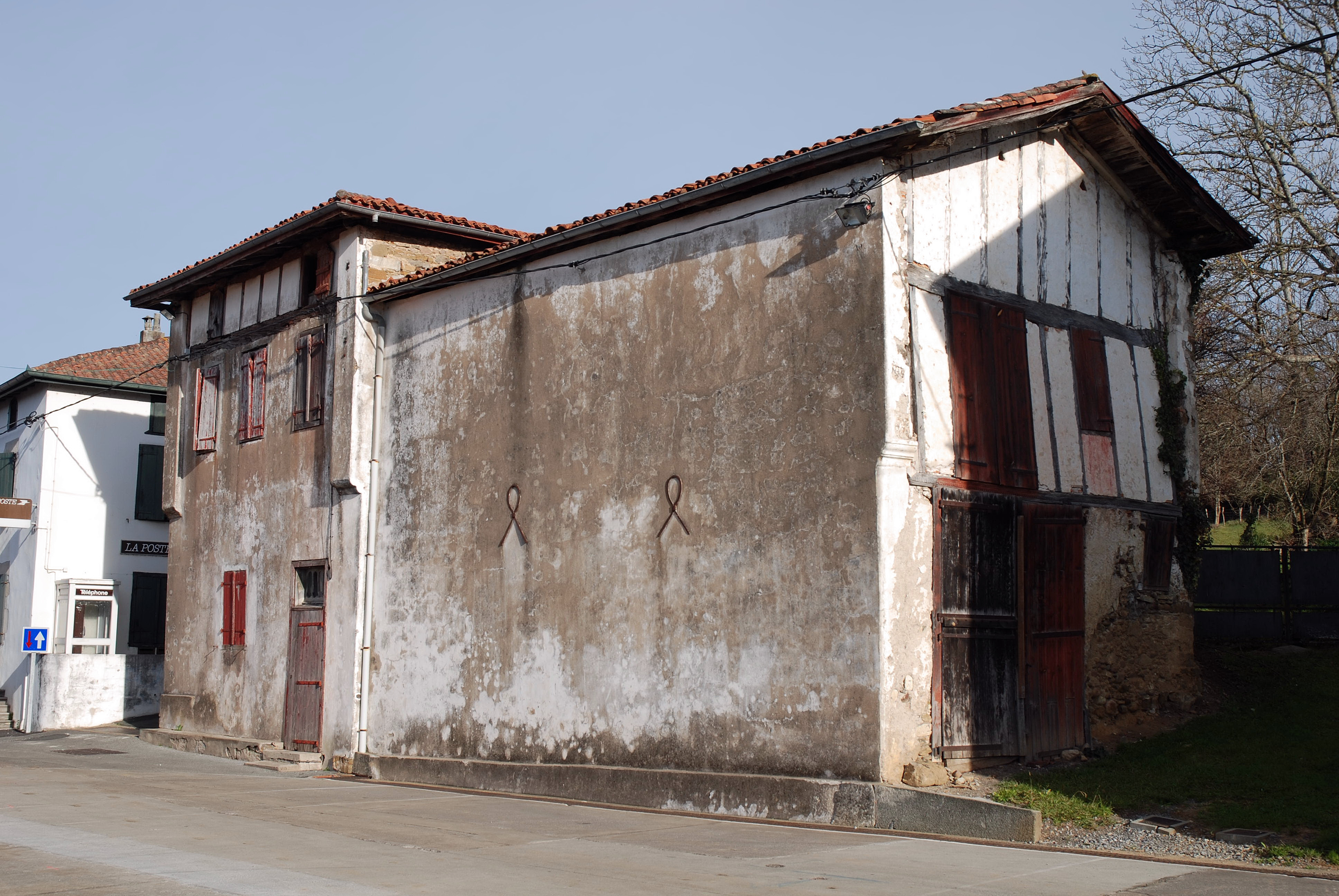 Halsou, vieille ferme. photo prise le 31/12/06 par Harrieta171